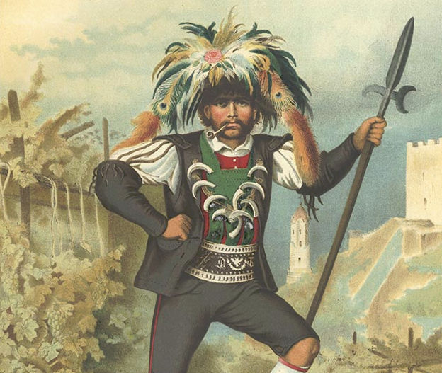 Deutsche Volkstrachten, Original-Zeichnungen mit erklärendem Text